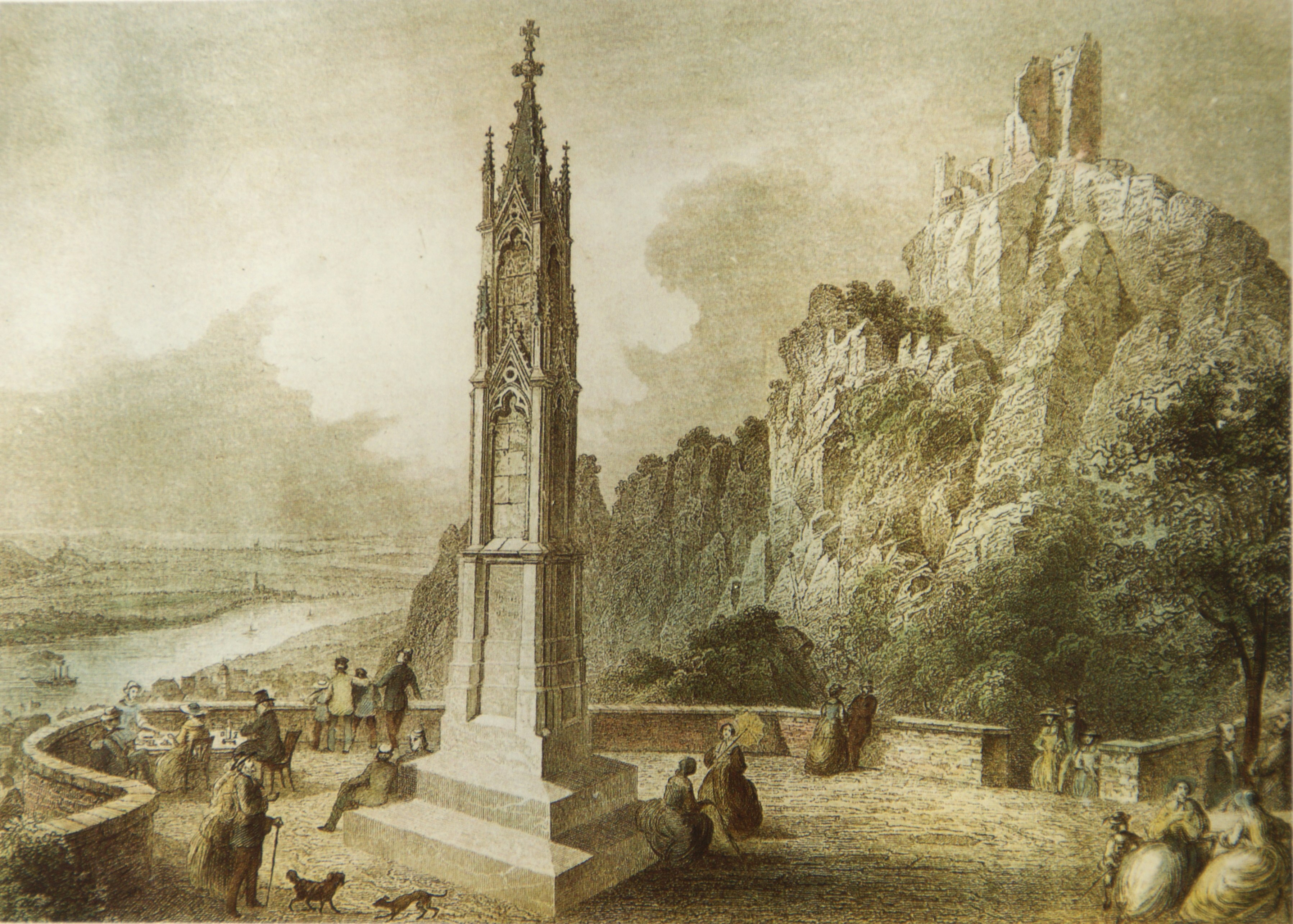 Plateau auf dem Drachenfels mit Denkmal, Stahlstich